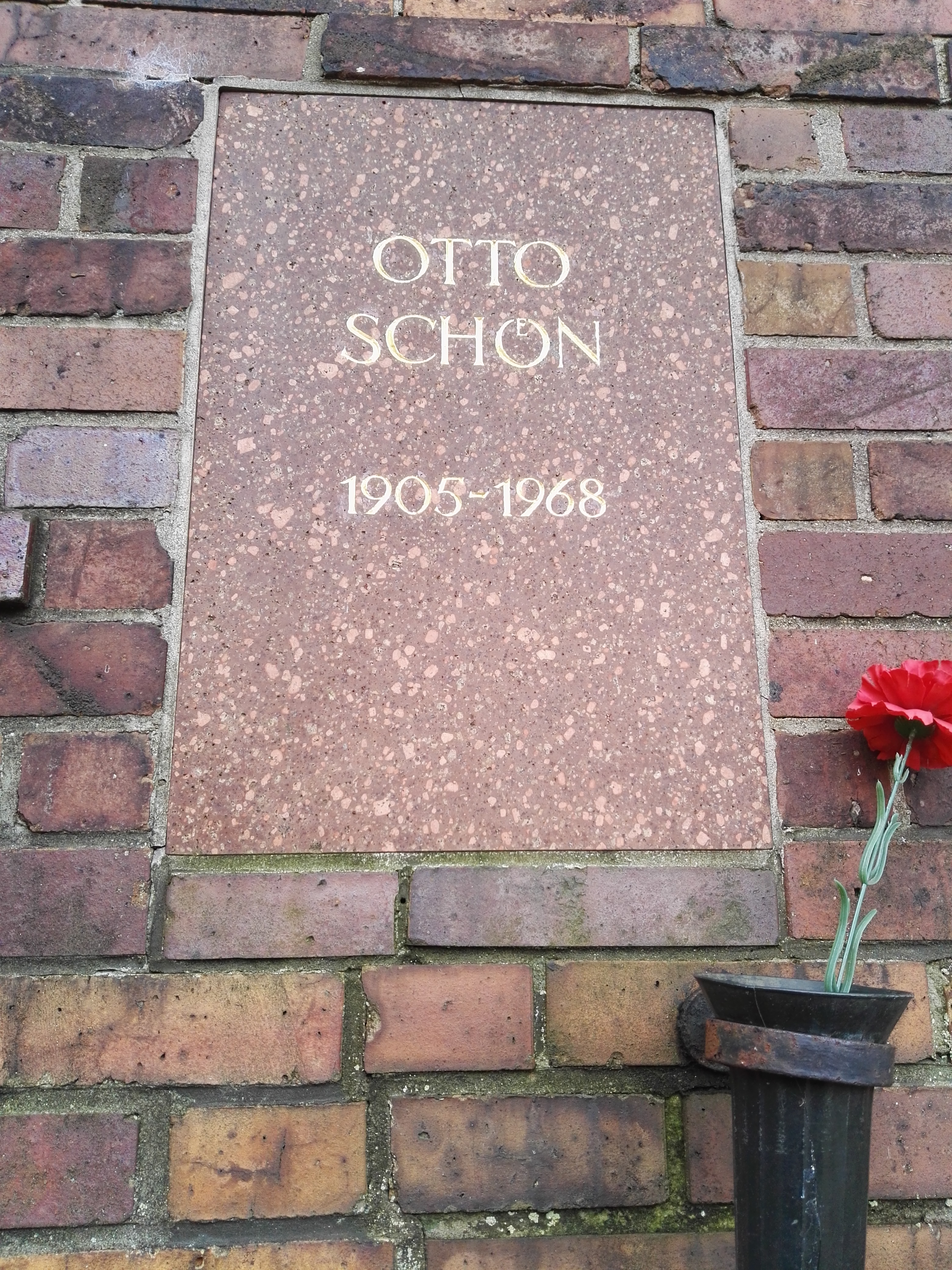 Grab von Otto Schön in der Gedenkstätte der Sozialisten auf dem Zentralfriedhof Friedrichsfelde in Berlin-Lichtenberg